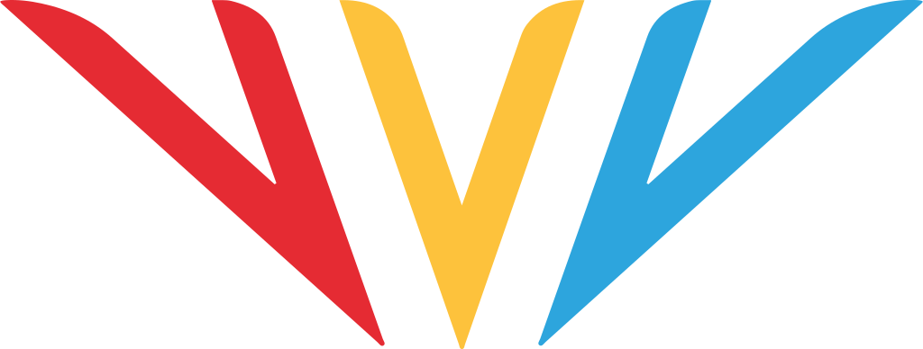 Nuevo logo de un certamen deportivo